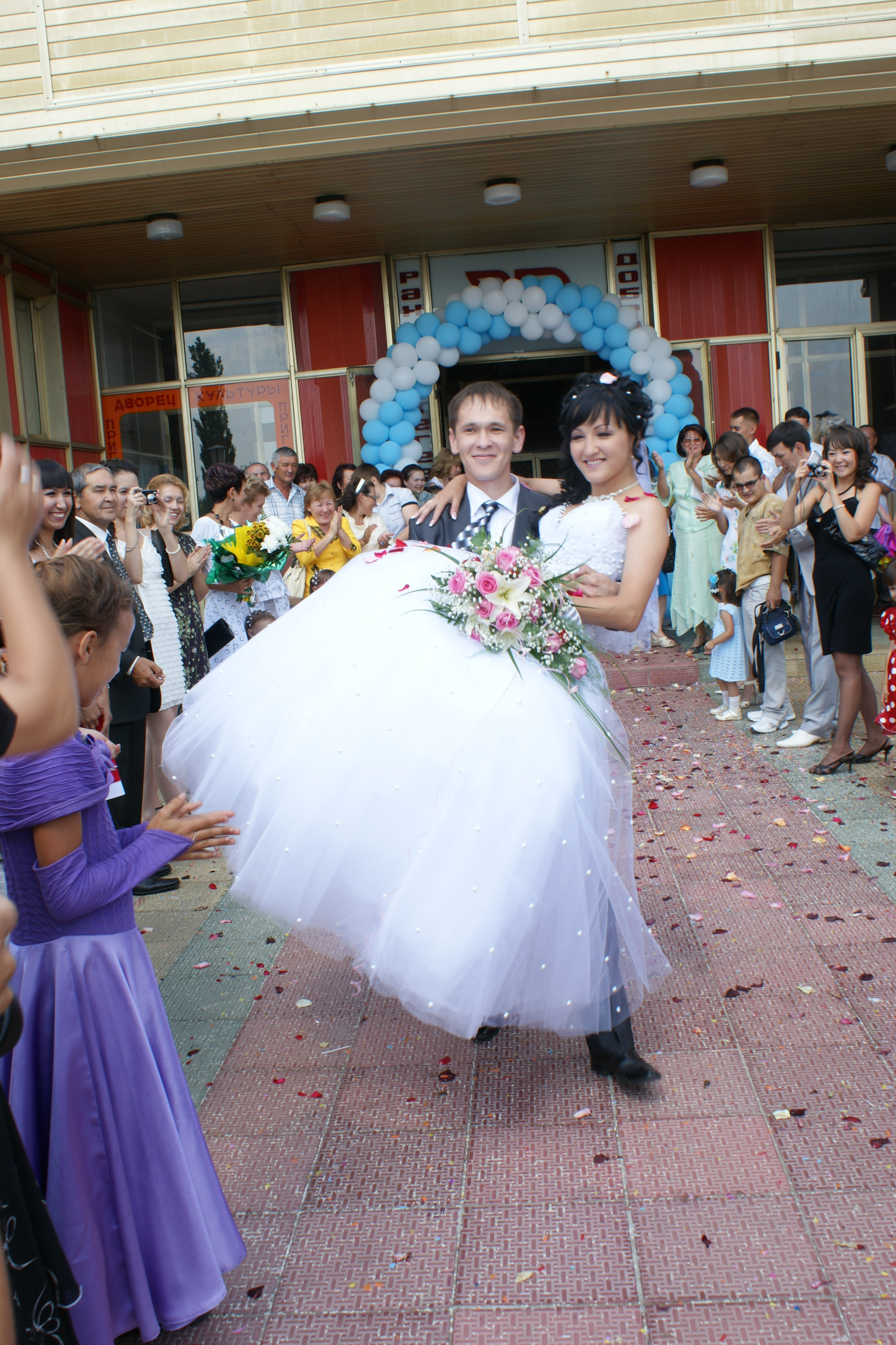 Башҡортса: Никах һарайы